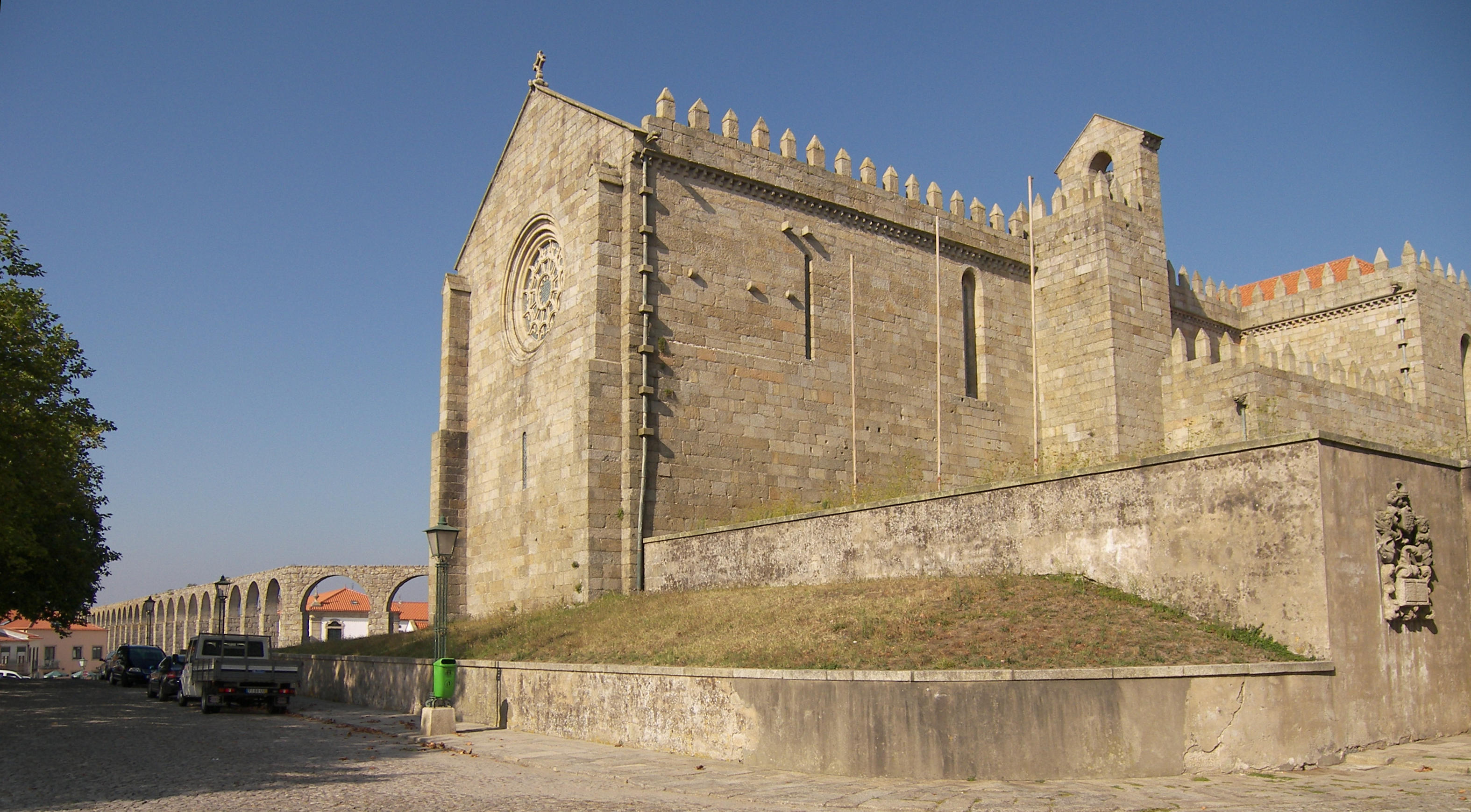 Vila do Conde, ehem. Karmeliterinnenkloster